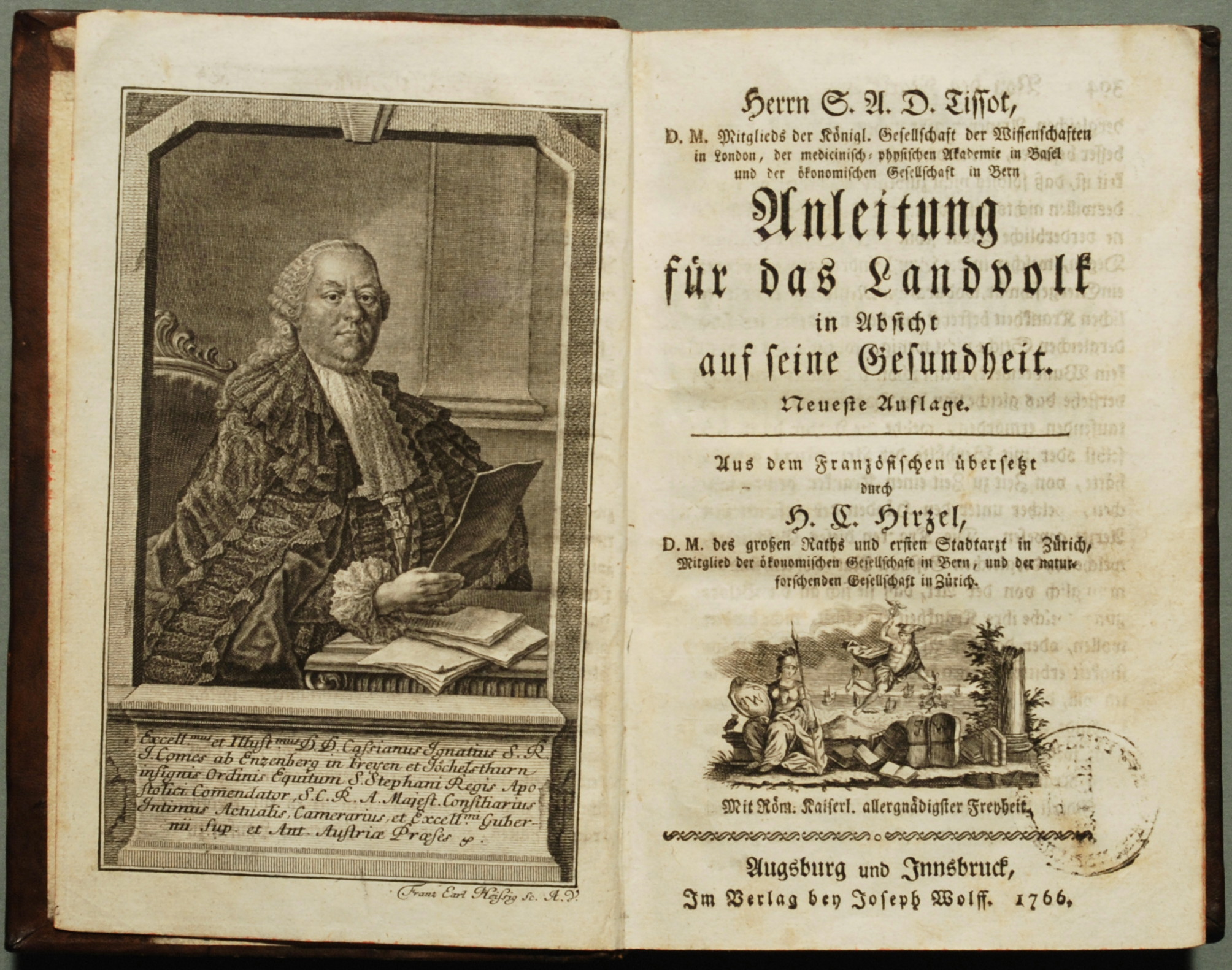 Populärwissenschaftliches Werk der Aufklärung in barocker Buchgestaltung (Rückenhöhe 18,5,cm). "Landvolk" im Sprachgebrauch des schweizer Übersetzers bedeutet zu dieser Zeit ´Bevölkerung´.- Auf dem Frontispiz ist nicht der Autor, sondern der Sponsor der Druckkosten porträtiert, Cassian Ignaz Grafvon Enzernberg. Der unternehmerische Verleger, der die Druckkosten ´vorlegt´, war 1766 noch eine Seltenheit.